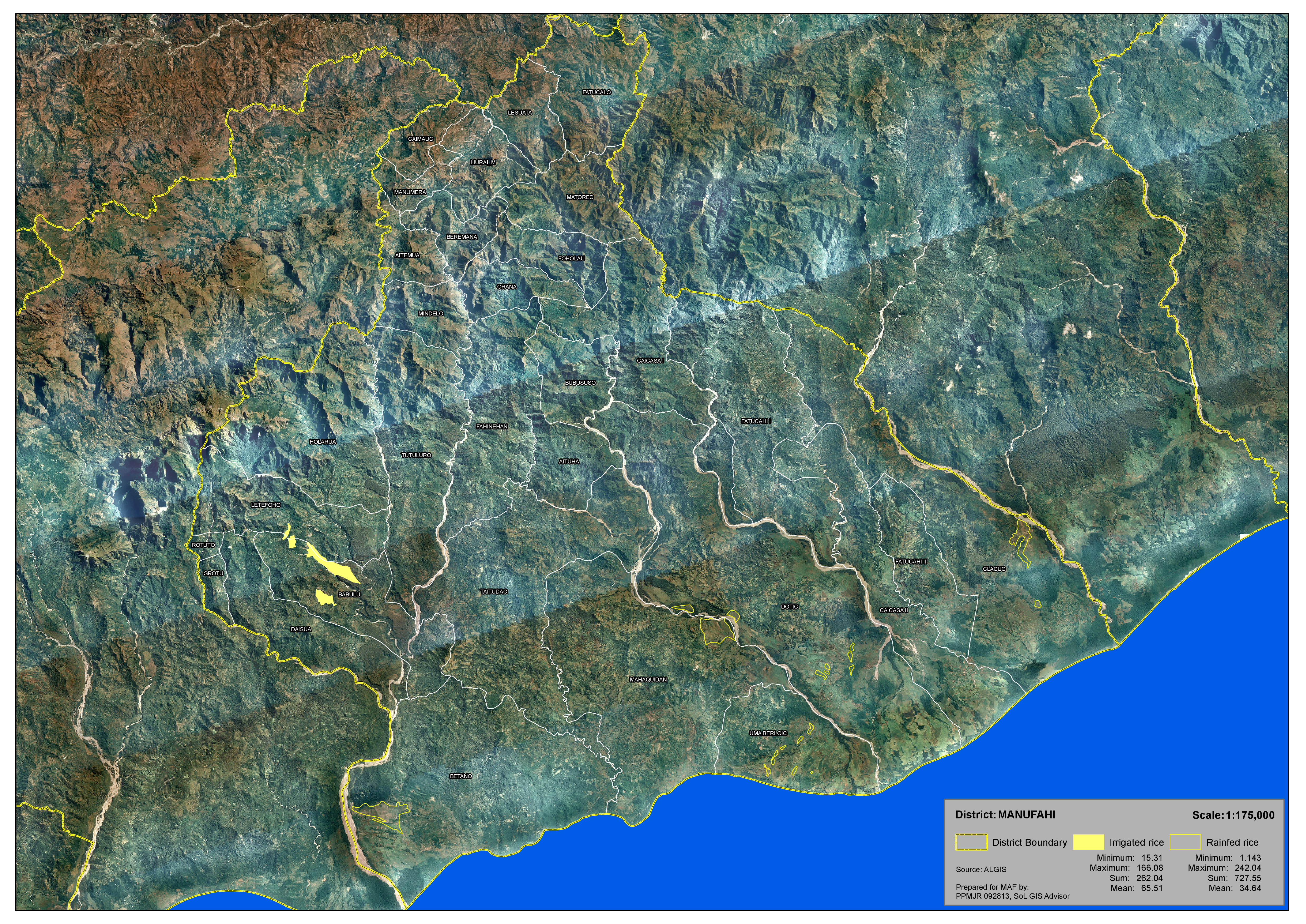 Reisfelder im Distrikt Manufahi